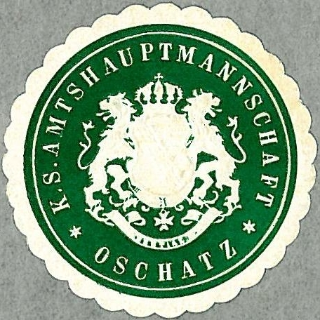 Siegelmarke der Amtshauptmannschaft Oschatz